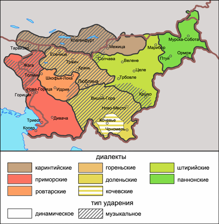 Карта распространения динамического и музыкального (тонического) типов ударения в диалектах словенского языка. Источники: Lencek Rado L. The structure and history of the Slovene language. — Columbus: Slavica, 1982. — P. 141. — ISBN 0-89357-099-0. Ponovne objave člankov s kartami za Slovenski lingvistični atlas (do leta 2008). Osnovna karta. Inštitut za slovenski jezik Frana Ramovša ZRC SAZU. Dialektološka sekcija (2016).